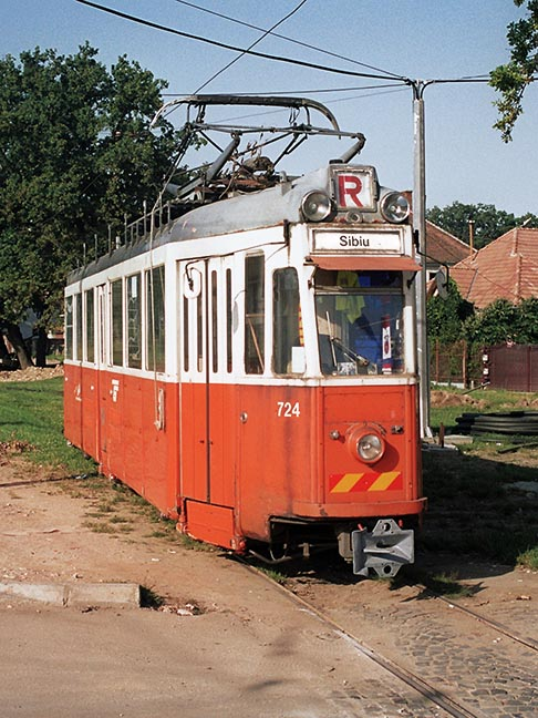 Tramway Hermannstadt-Reschinar